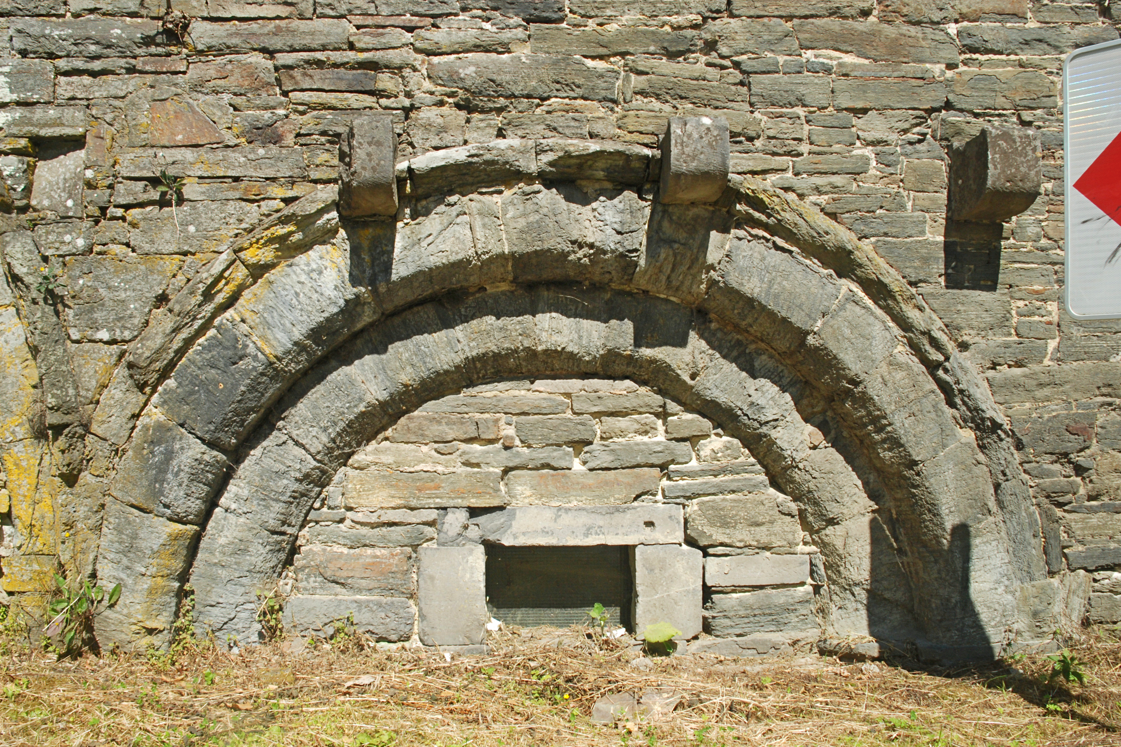 Belgique - Brabant wallon - Villers-la-Ville - Porte de Bruxelles